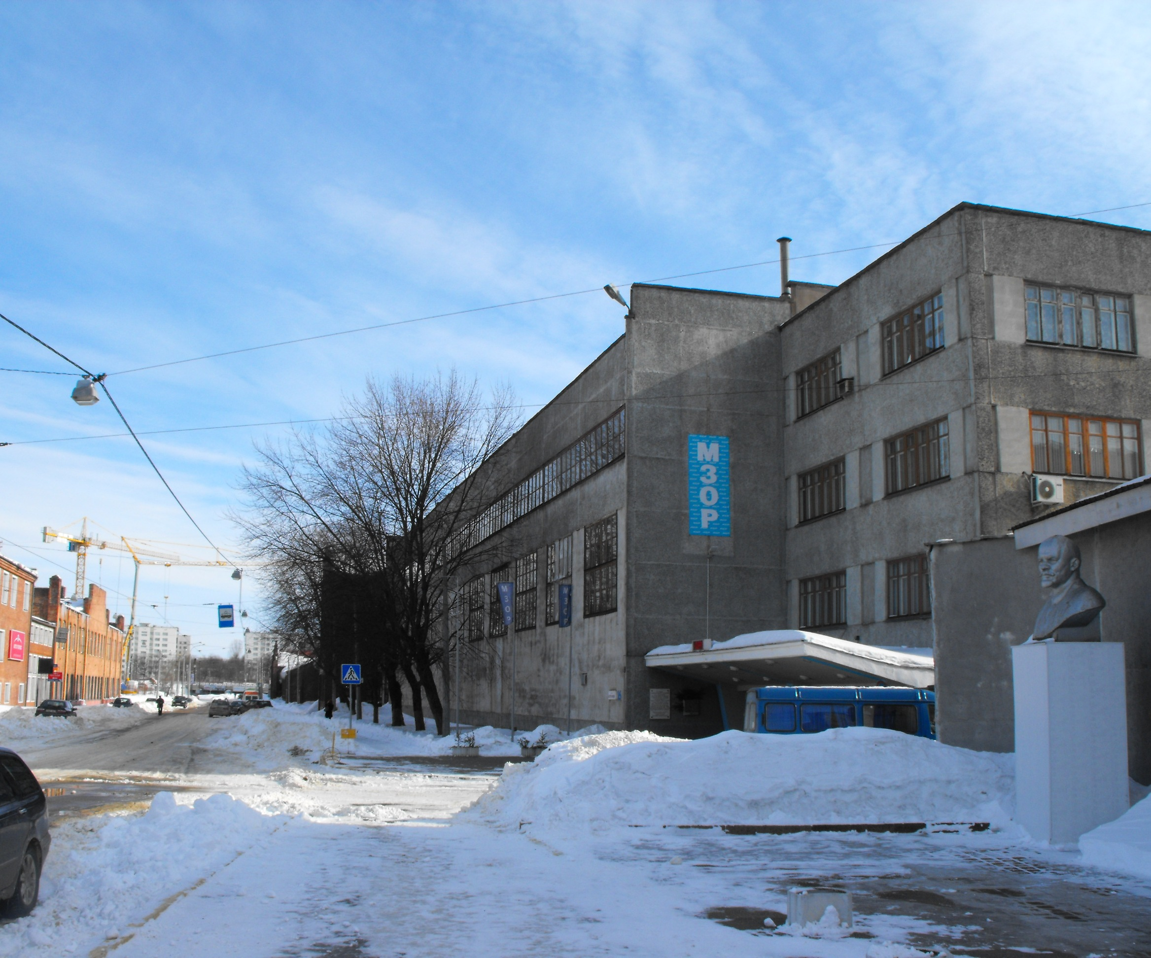 Минск, улица Октябрьская. Март 2013 года.